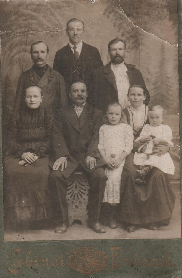 Василий Владимирович по середине